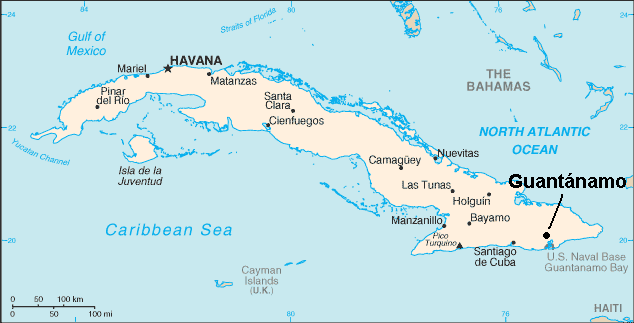 A map of Guantánamo city La bildo estas kopiita de en.